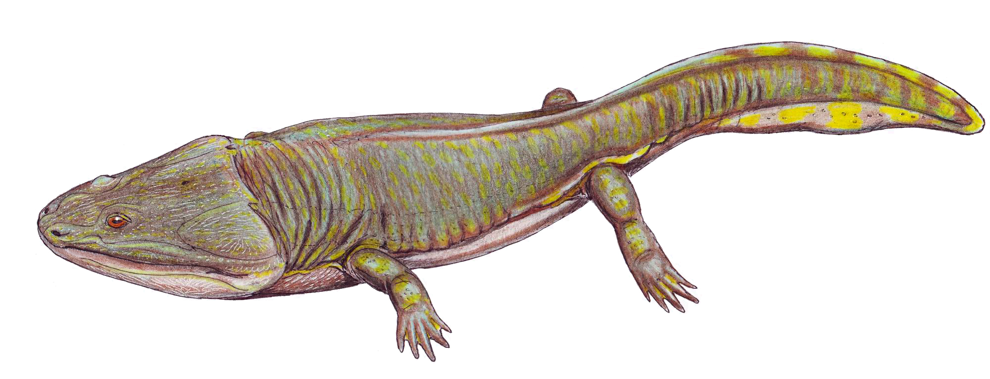 Metoposaurus diagnosticus kraselovi